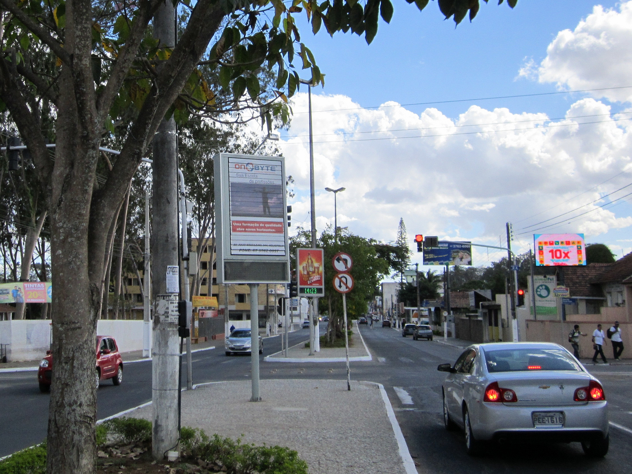 Avenida Rui Barbosa, Heliópolis - Garanhuns - Pernambuco - Brasil